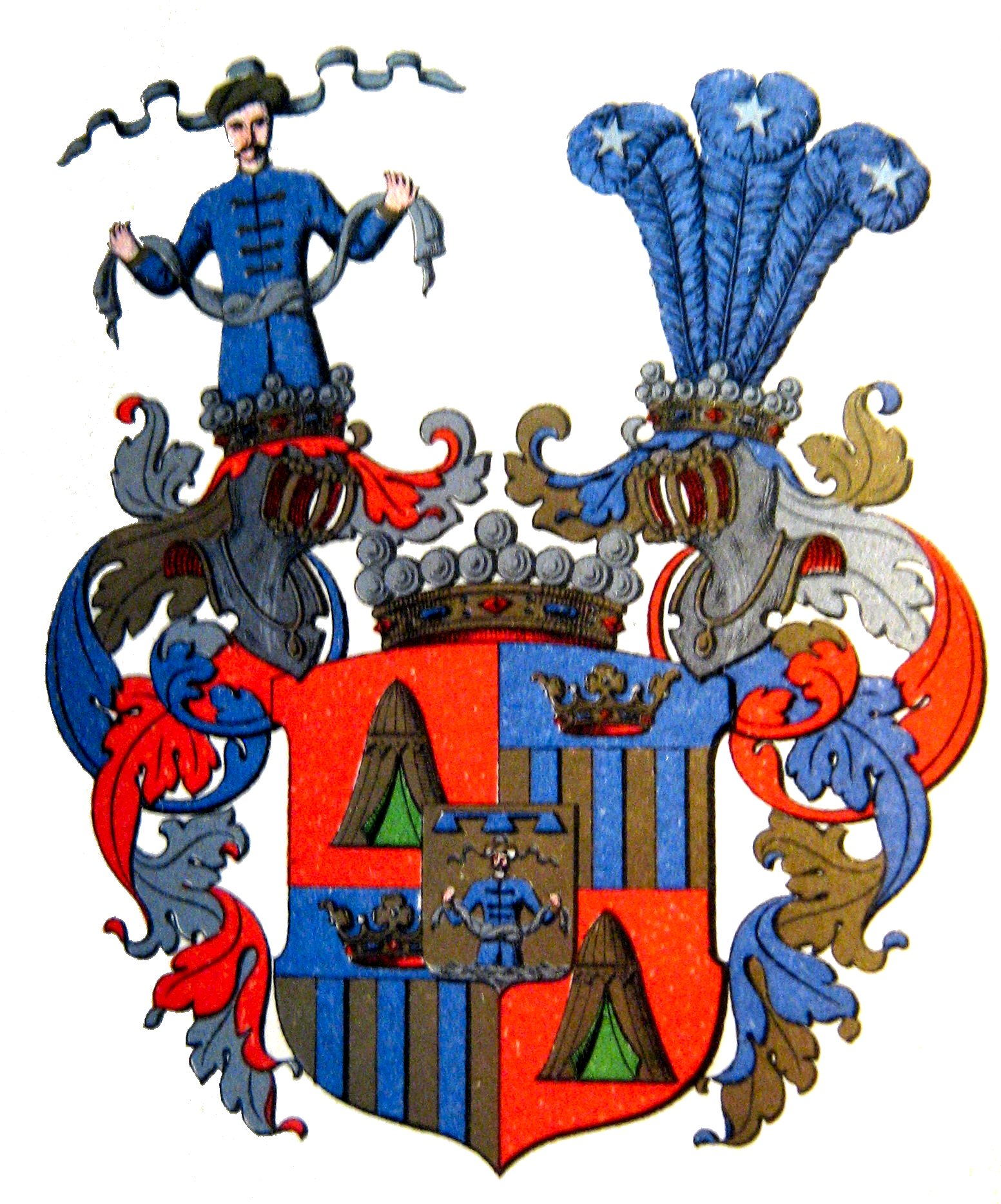 Friherrliga ätten von Dübens vapen